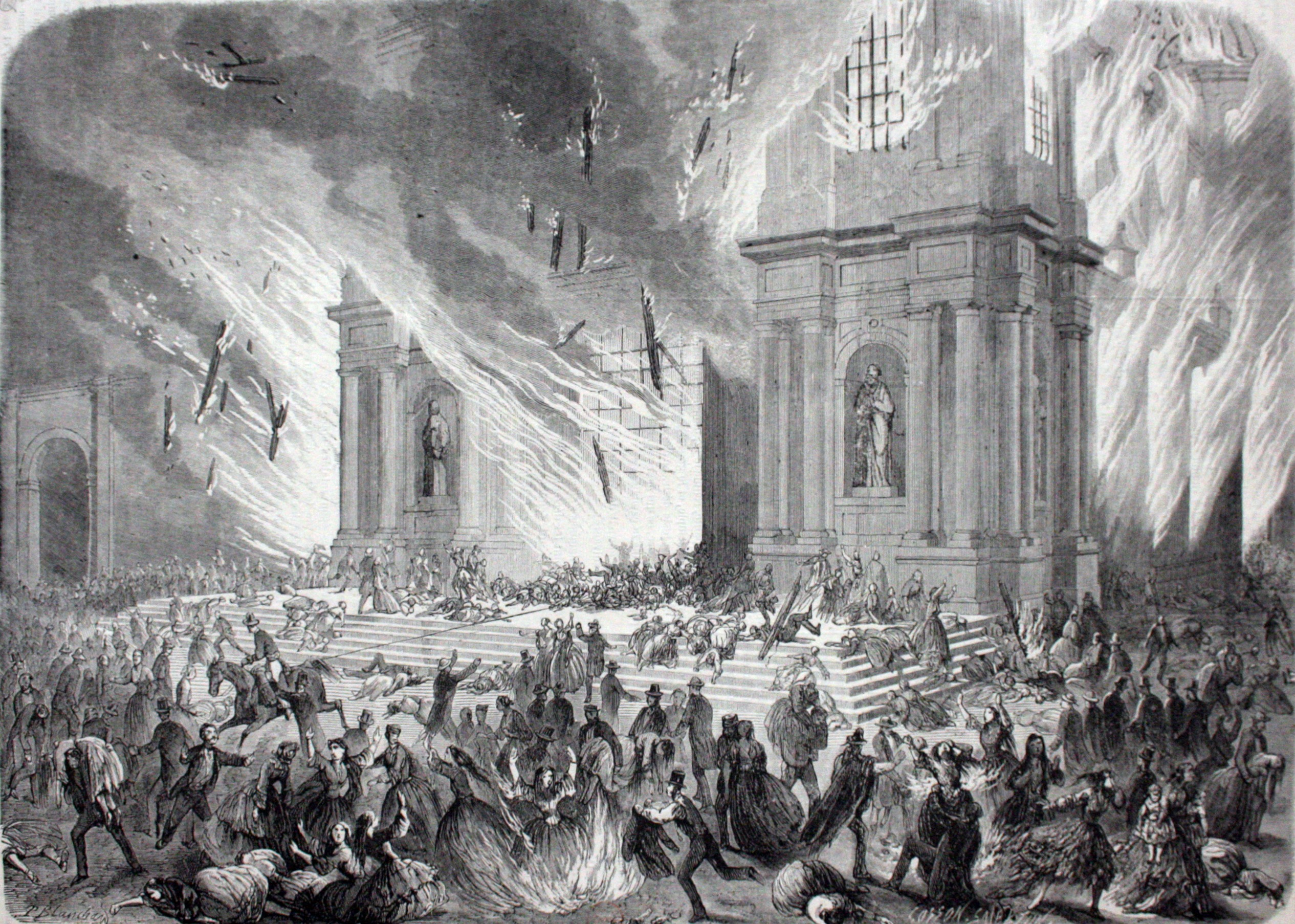 La escena describe el incendio de la Iglesia de la Compañía de Jesús en Santiago ocurrido el 8 de diciembre de 1863